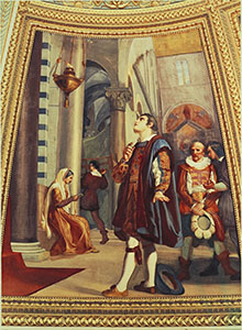 Galileo Galilei osserva la lampada nel Duomo di Pisa, affresco di Luigi Sabatelli, Tribuna di Galileo, Firenze.